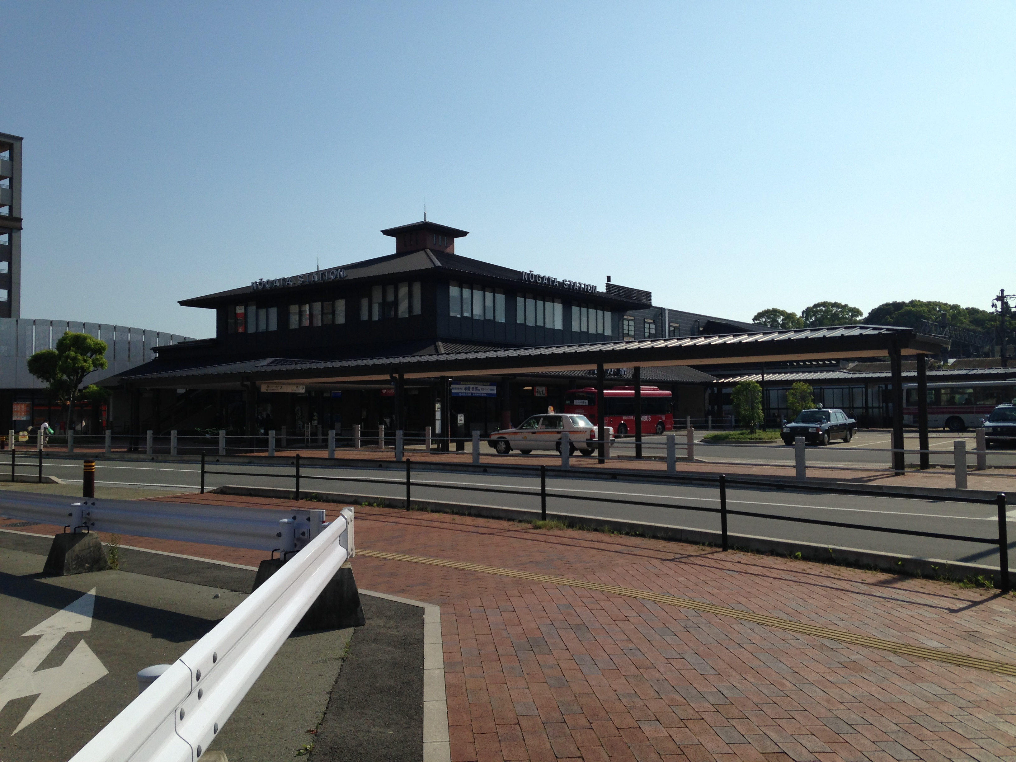 直方駅の遠景